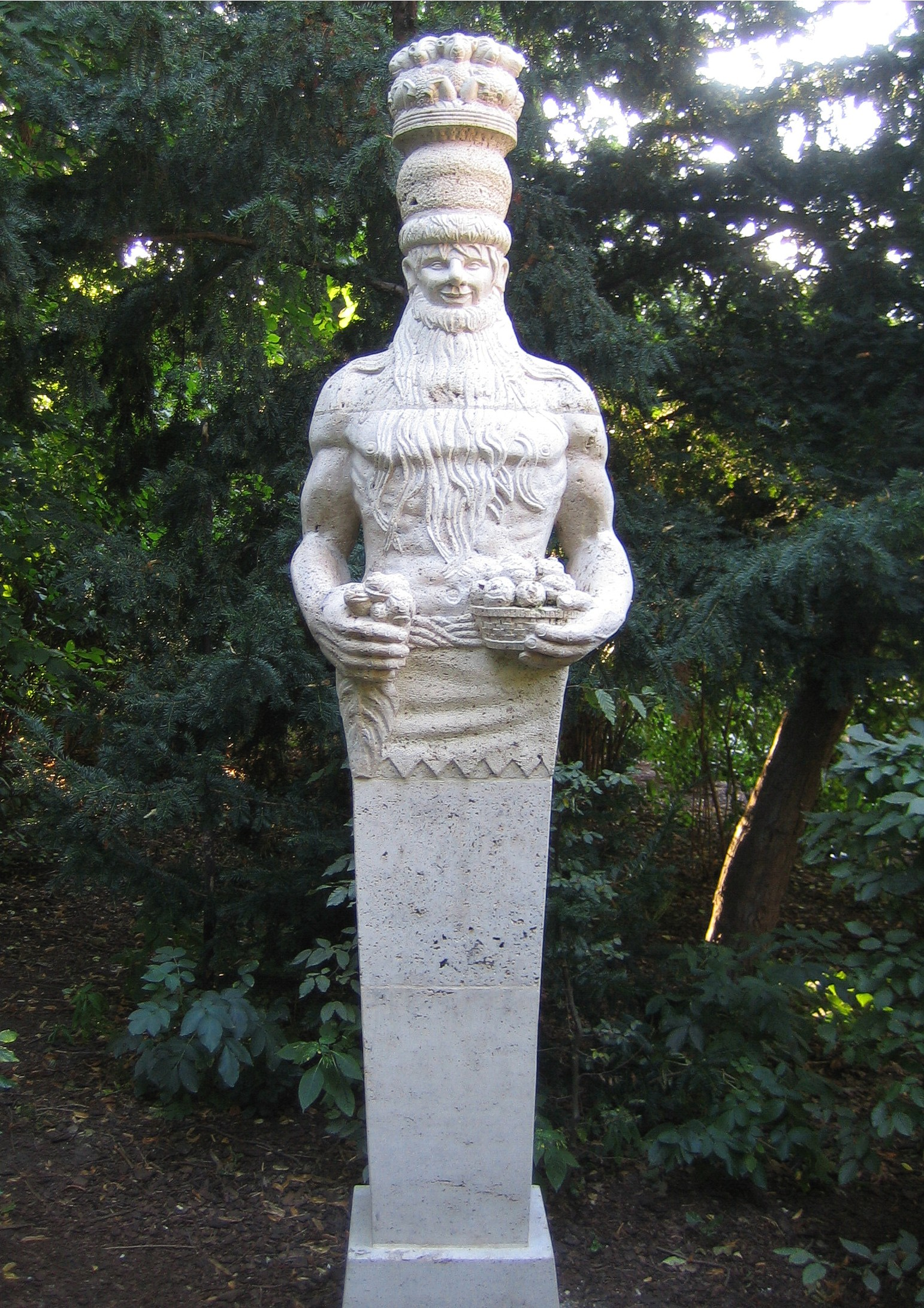 Märchenbrunnen im Berliner Volkspark Friedrichshain. Hermenfigur "Rübezahl" von Georg Wrba an einem Seitenweg neben dem Brunnen.